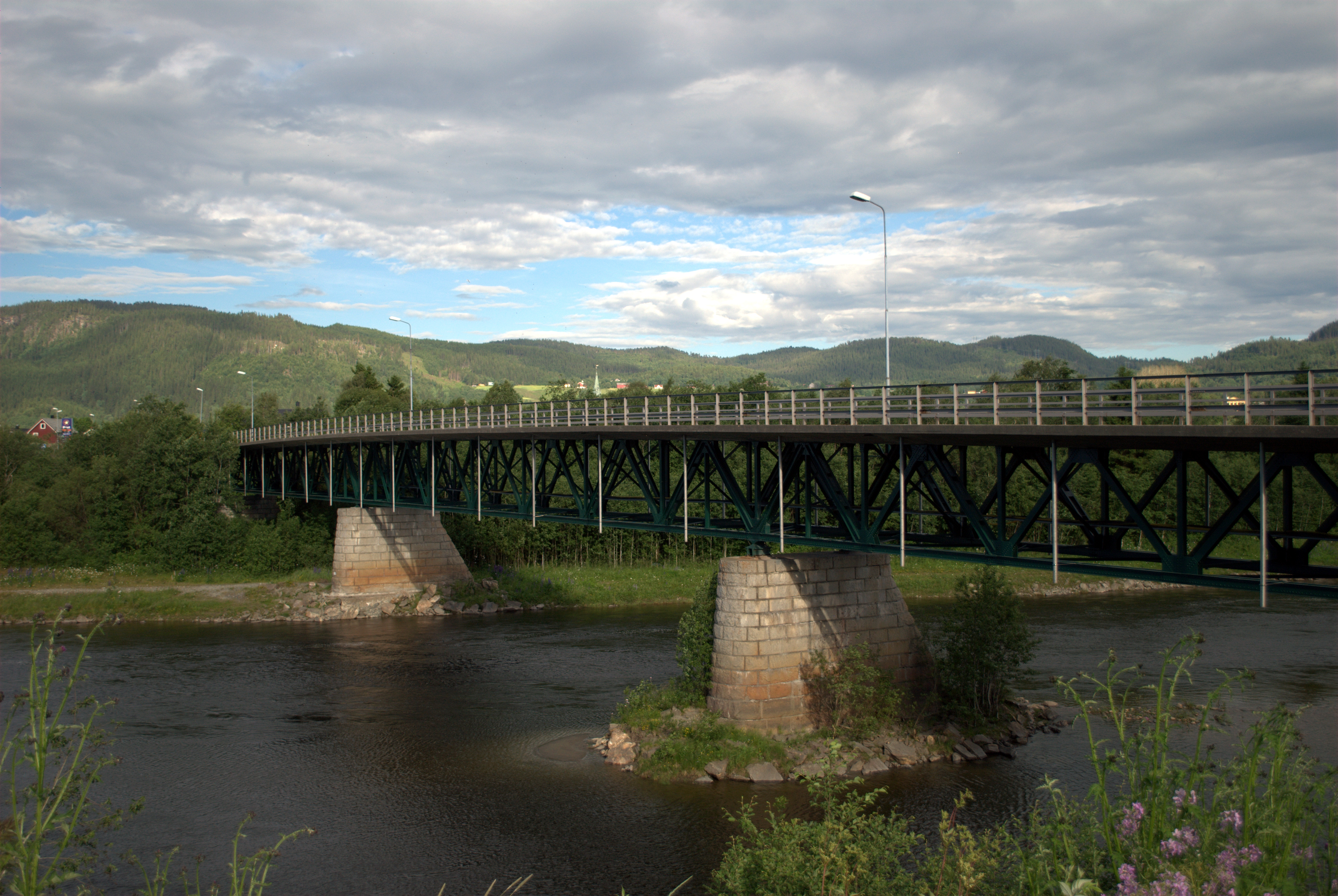 Forve bru (FV65) vest for tettstedet Fannrem i Orkdal kommune i Sør-Trøndelag.